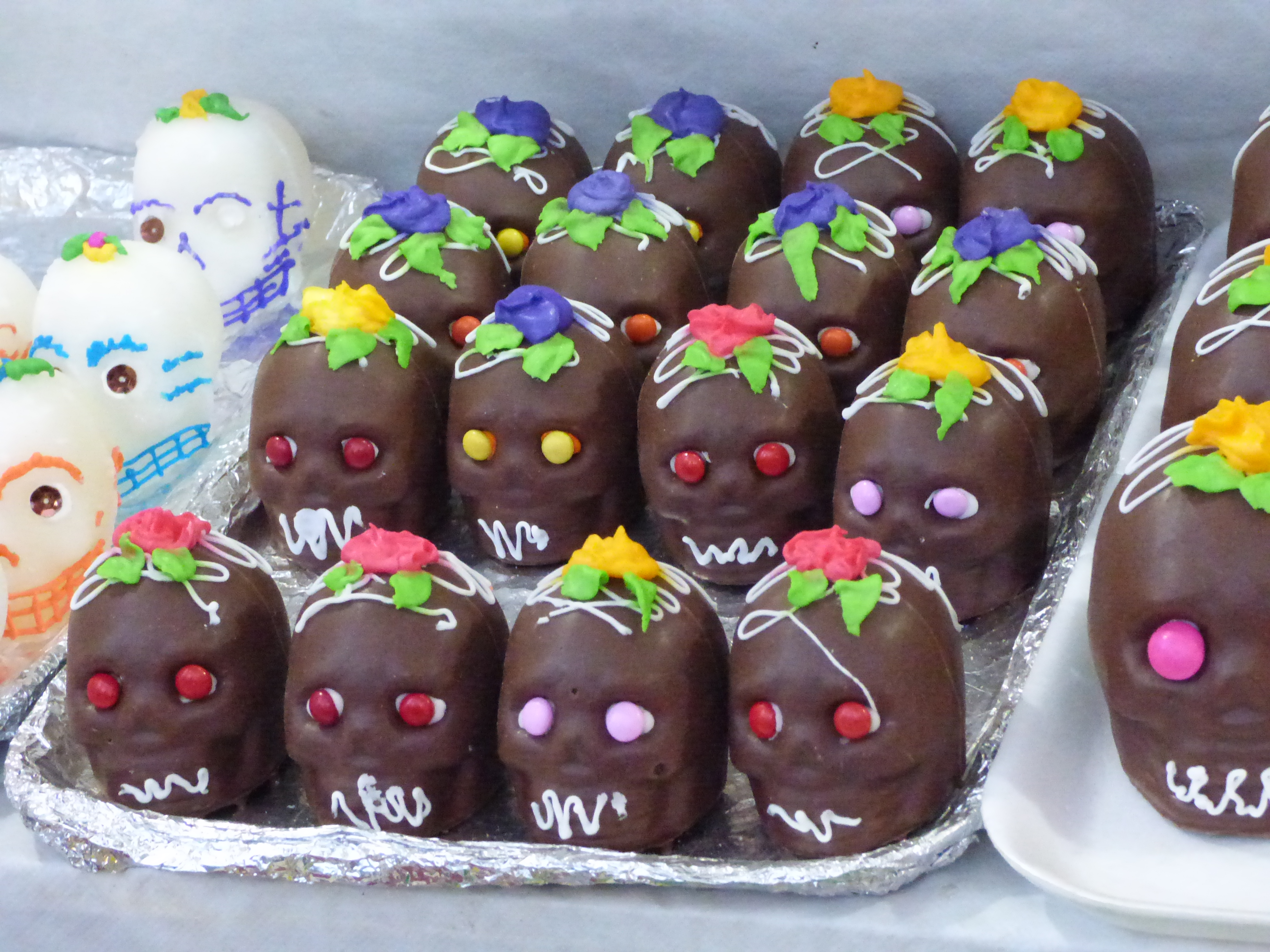 Calaveras de chocolate. Festival de las Calaveras, Aguascalientes 2014